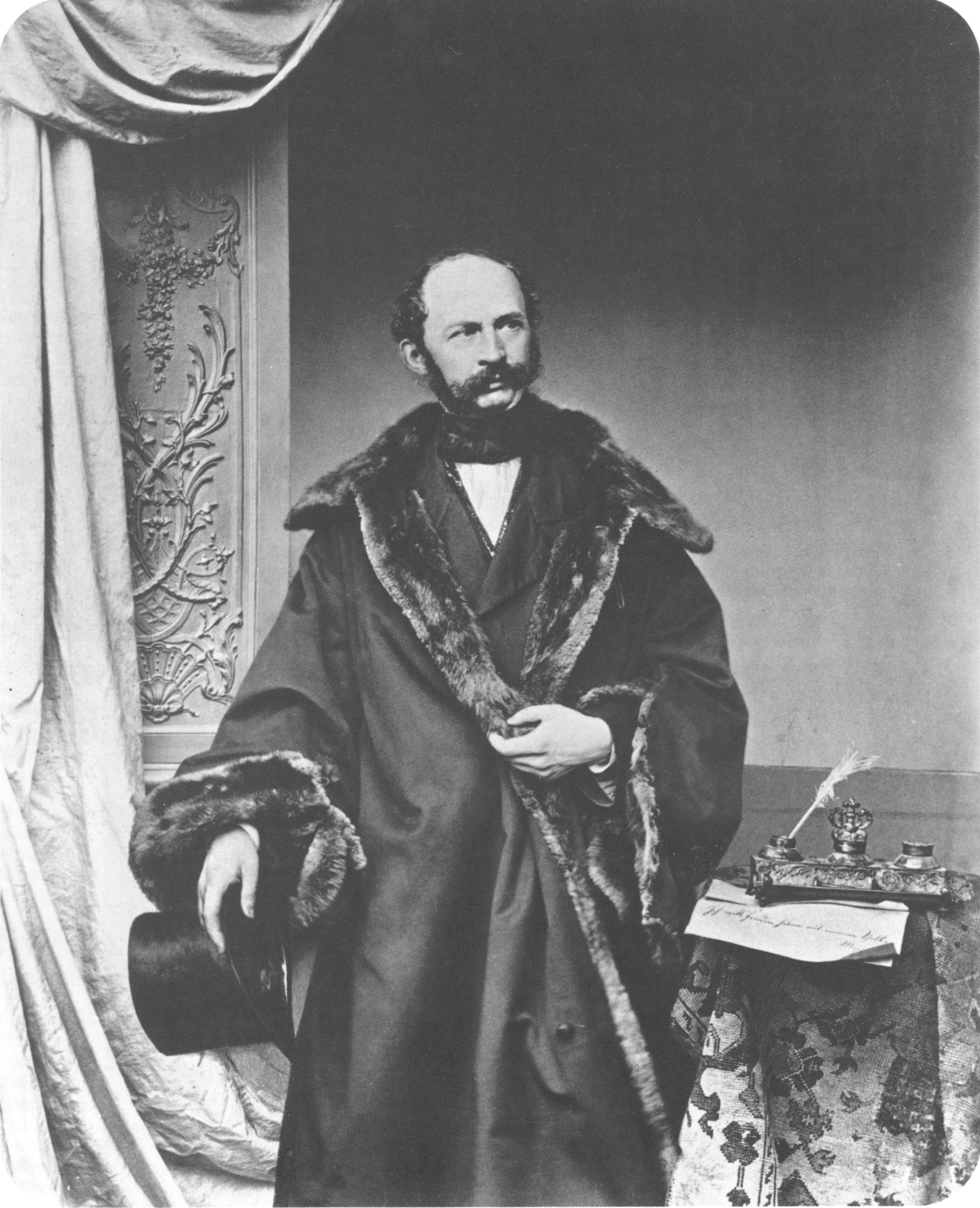 Max II., König von Bayern (1811-1864)